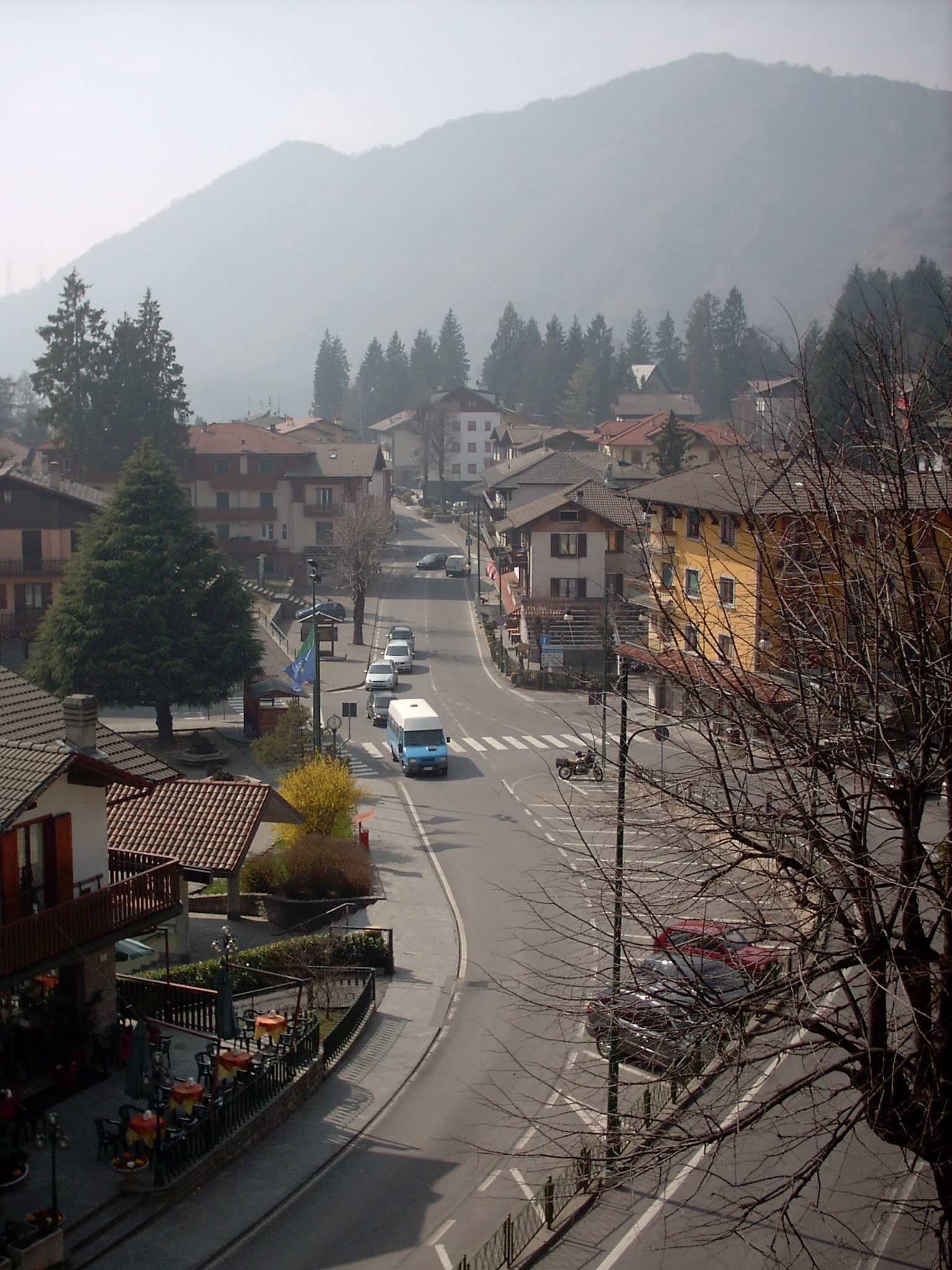 Selvino, Bergamo, Italia